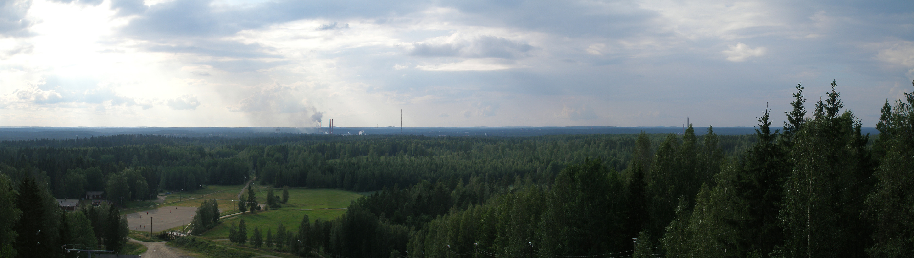 Korkeakangas panorama